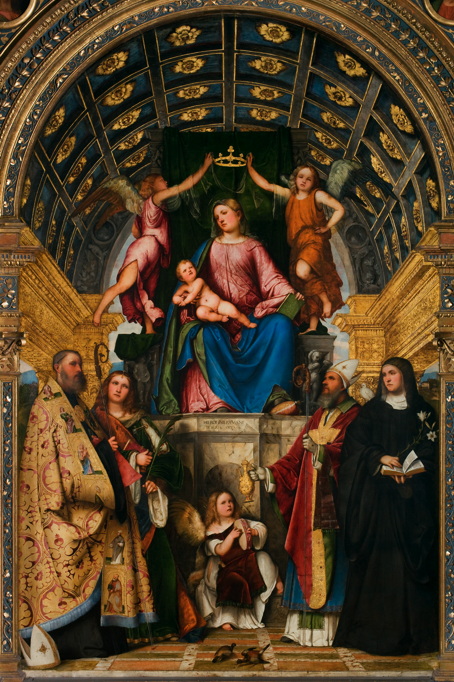 detail